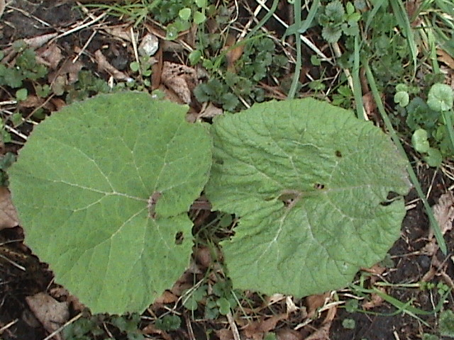 Petasites hybridus (Leafs)